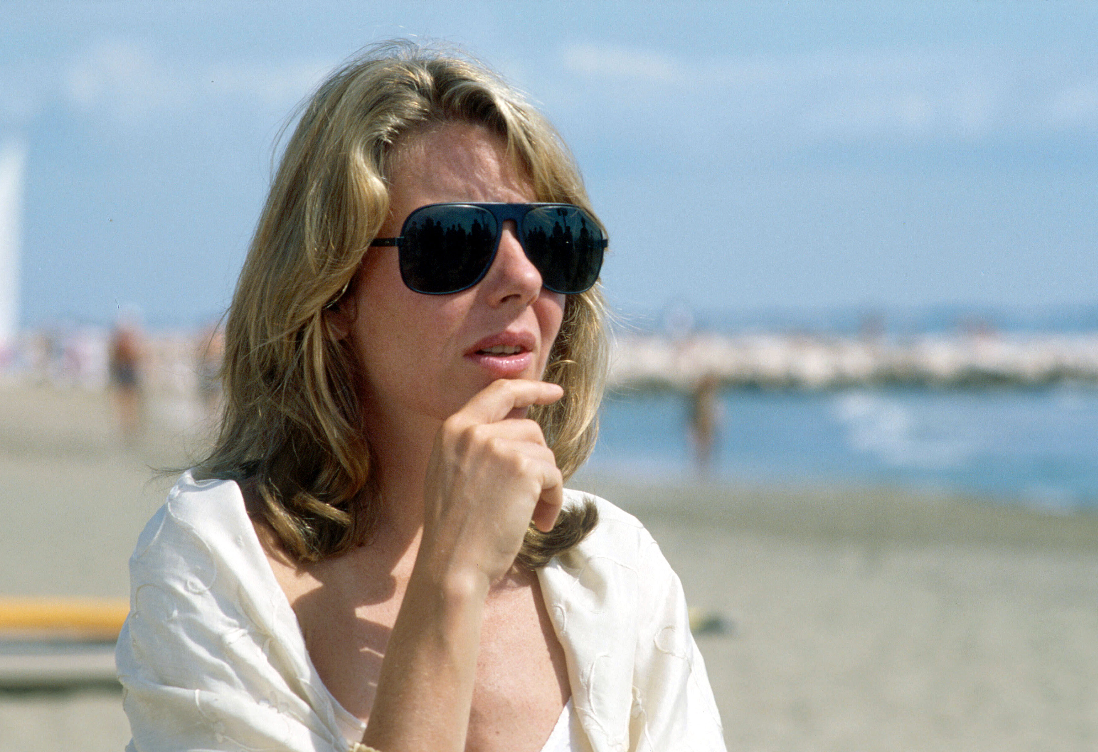 L'attrice Jill Clayburgh alla Mostra del cinema di Venezia del 1983